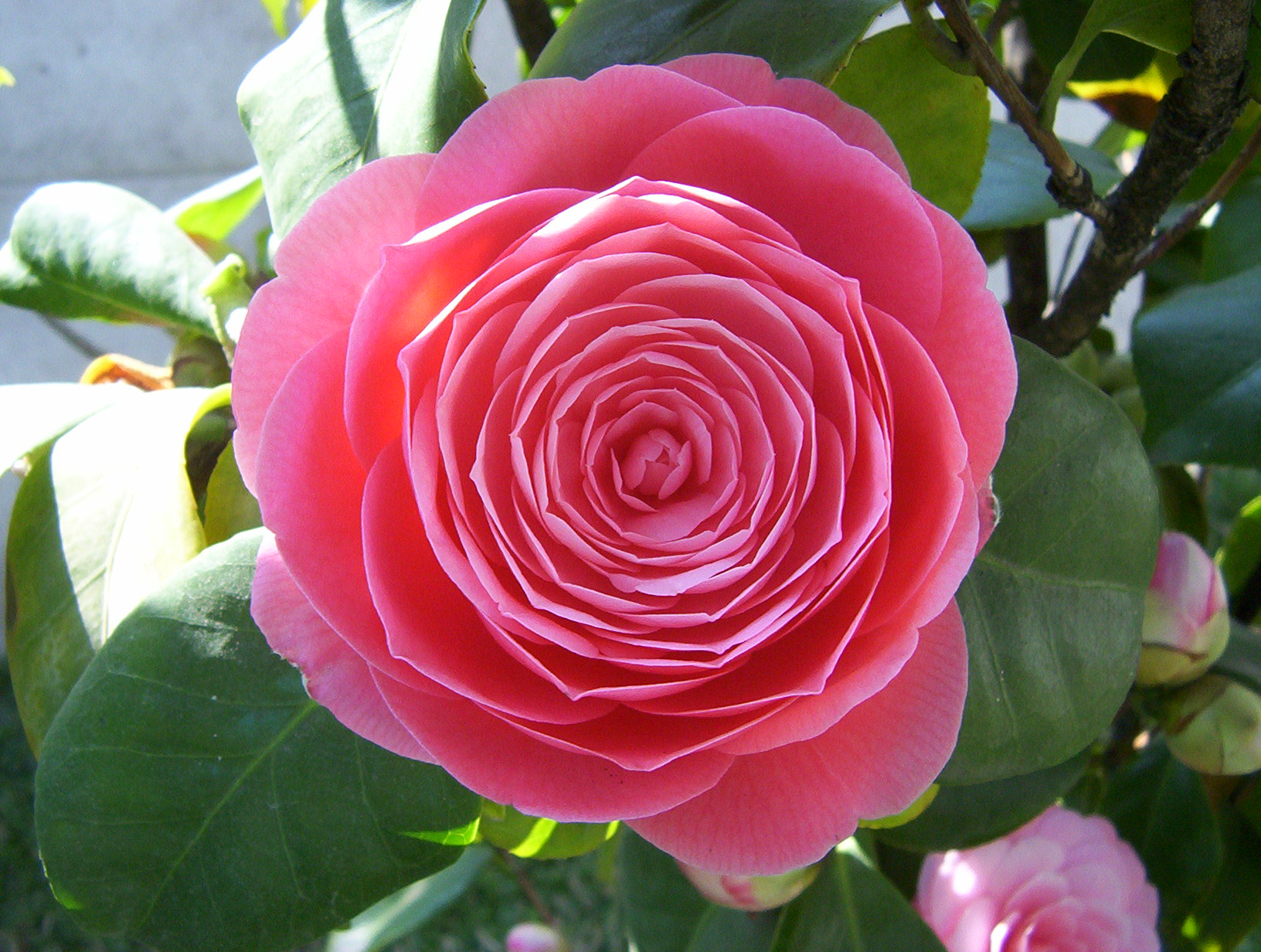 Camellia japónica color rosa